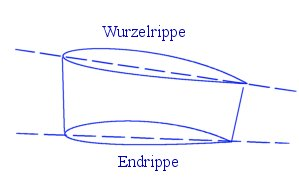 Grafik zur Darstellung von geom. Schränkung